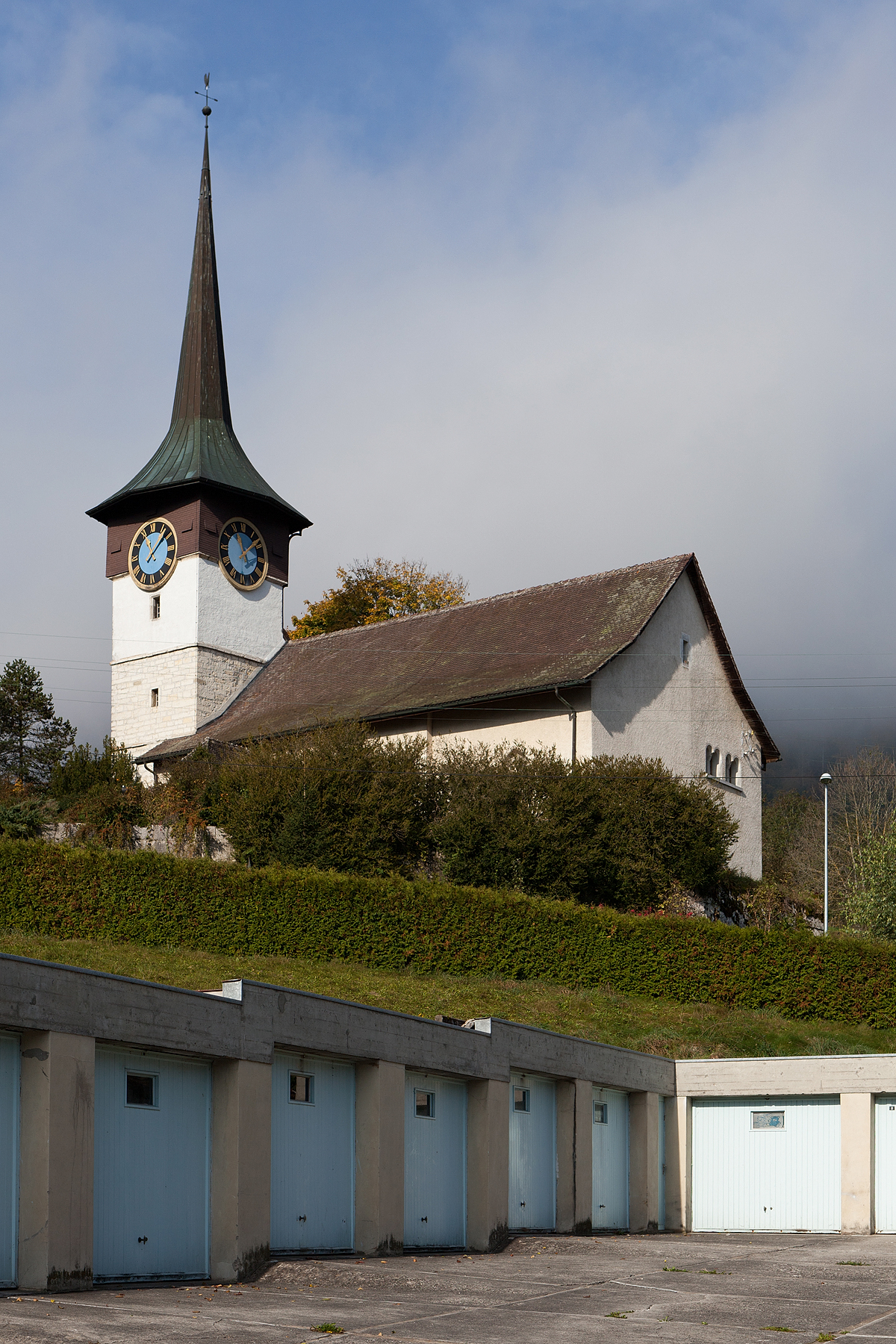 Temple de Courtelary (BE)